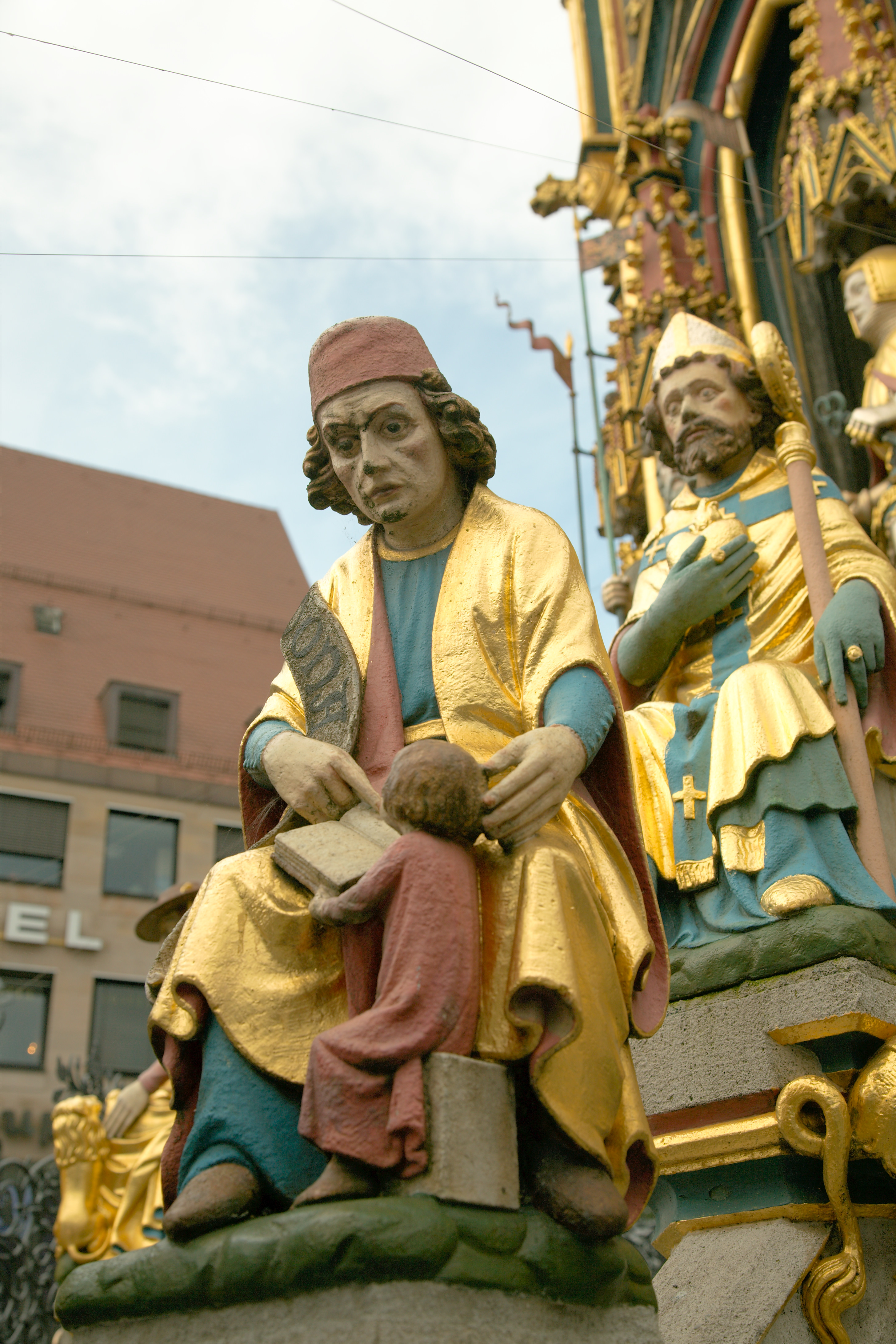 Schöner Brunnen in Nürnberg